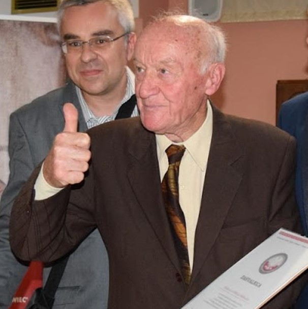 Tomislav Durtka, Miloš Mišković / stowarzyszenie Polaków "Bolesławiec" z Prnjavora